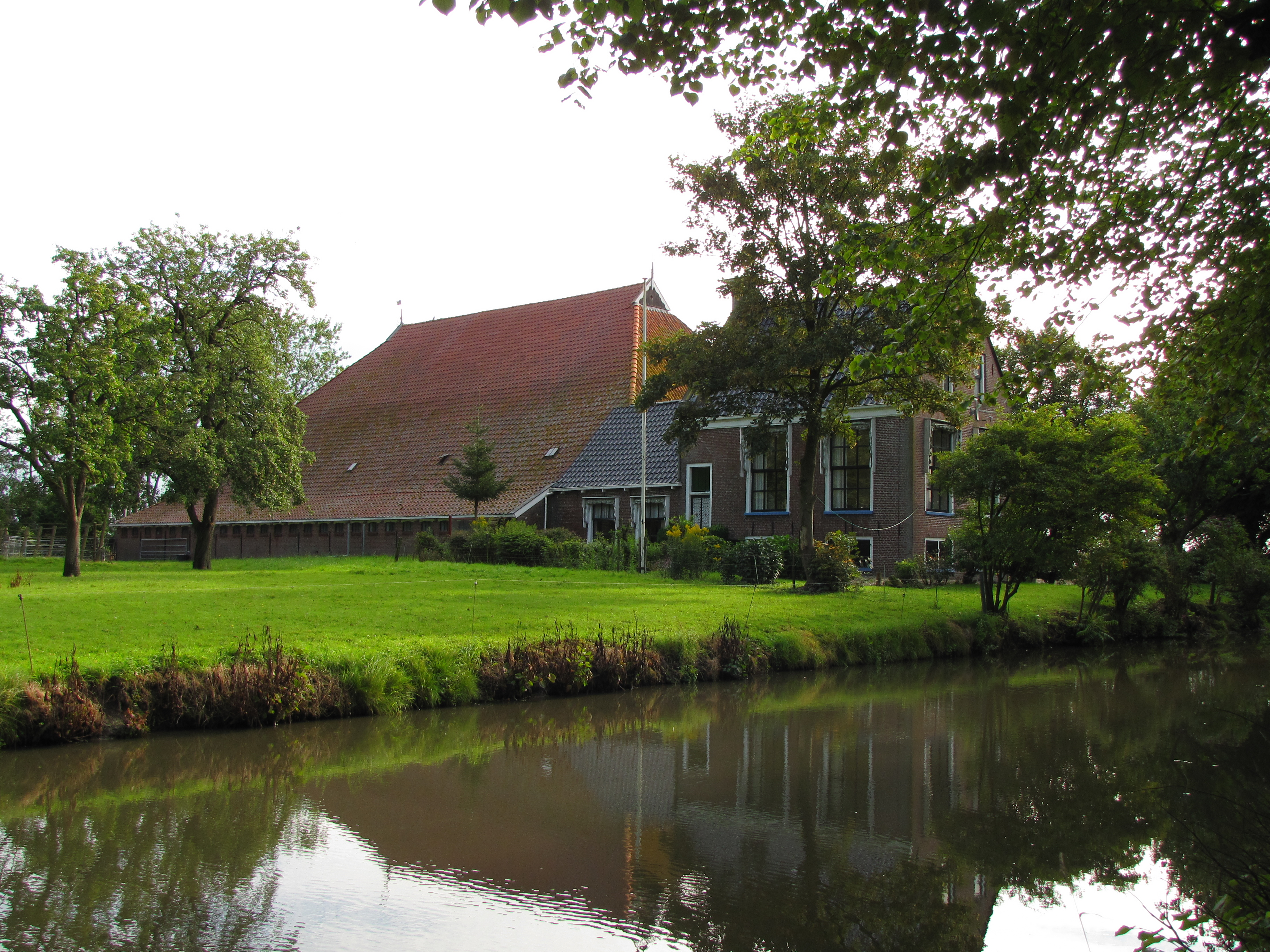 Het oorspronkelijke Tjepma state dateert reeds uit de 15e eeuw. In de 17de en 18de eeuw gold het huis als adellijke state. Als synoniem van Tjepma wordt in 1718 en 1850 "it Langstek al eer Tjepma" vermeld.